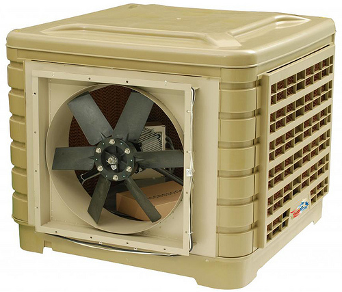 Klimatyzator ewaporacyjny bezpośredni z wylotem powietrza z boku. Wentylator osiowy.